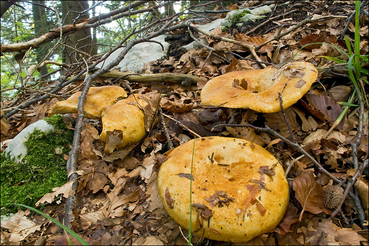 Lactarius scrobiculatus (Scop.) Fr.